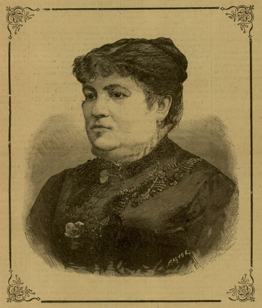 Guiomar Torresão.